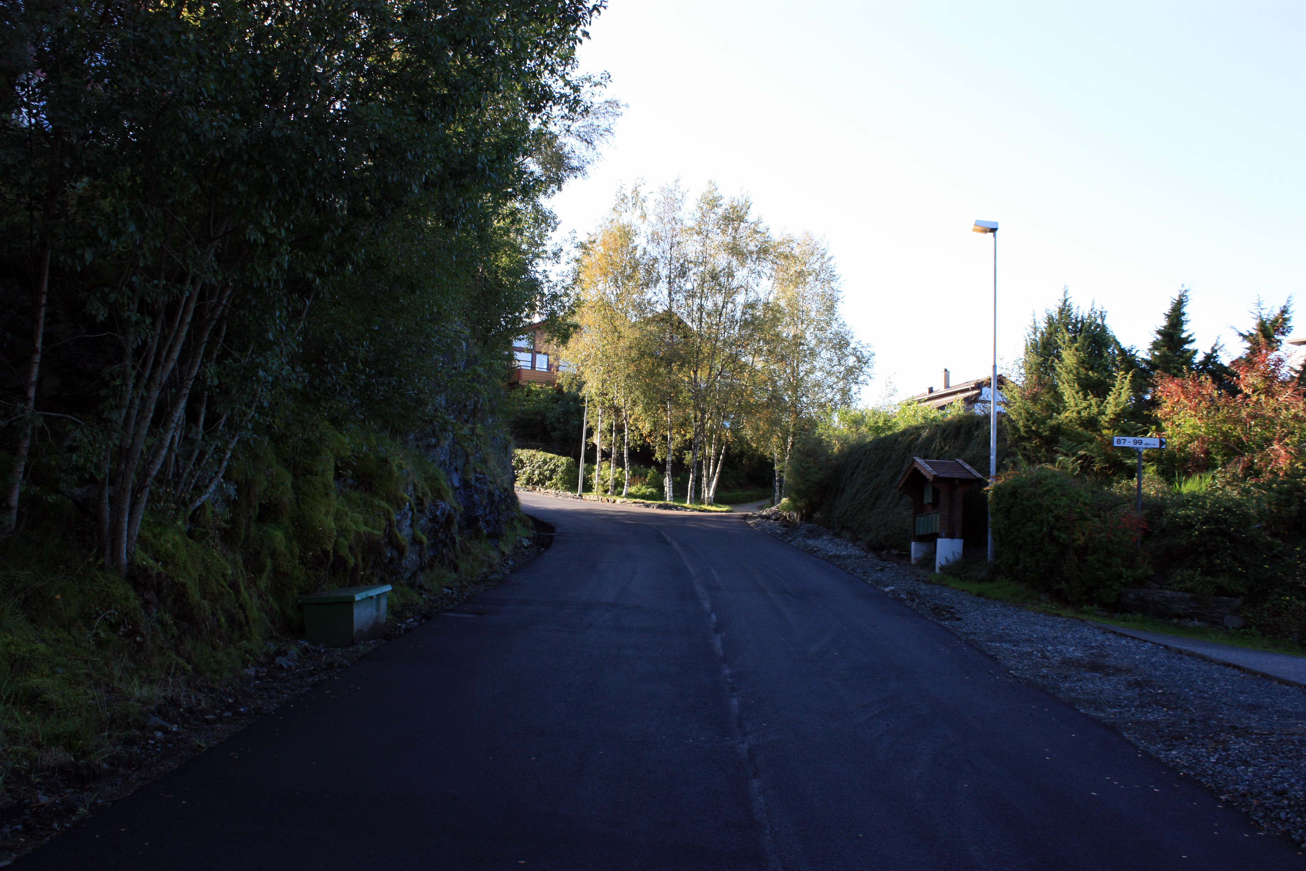 Bjøllebotn, Fana, Bergen.